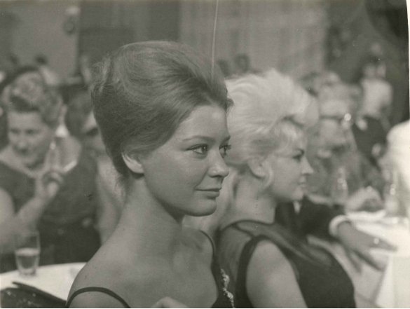 Attrice italiana